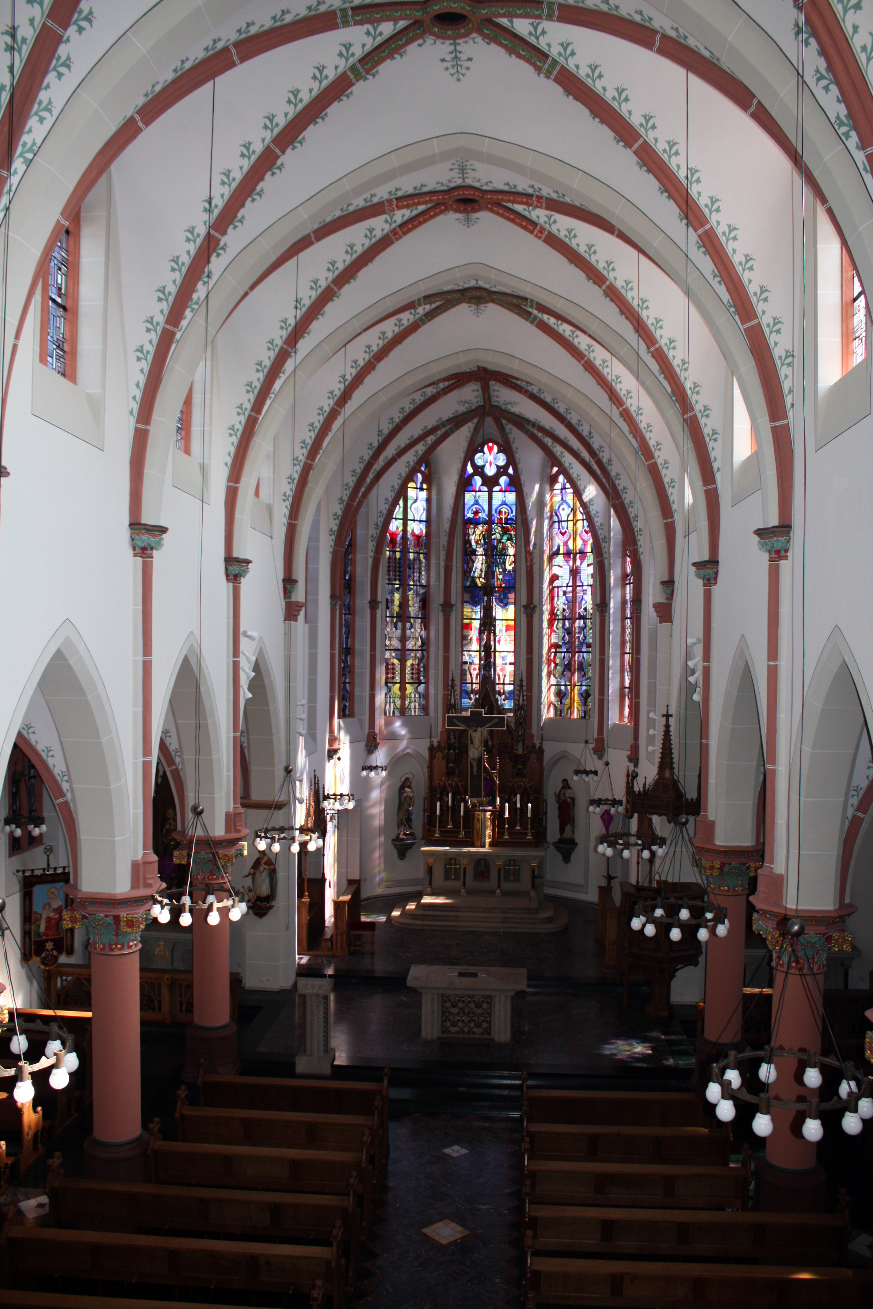 St. Martin, Friesheim Mittelschiff und Chor